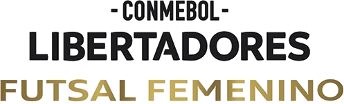 Logo de la Conmebol Libertadores de Futsal Femenino